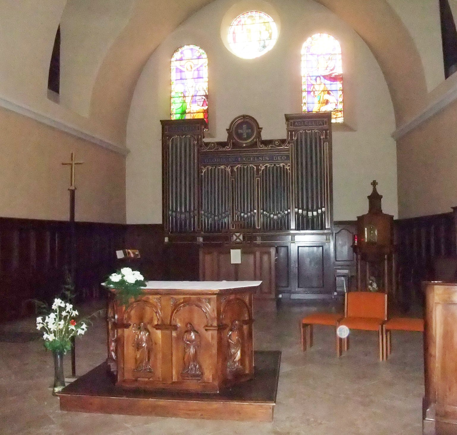 Boulieu église orgue et choeur